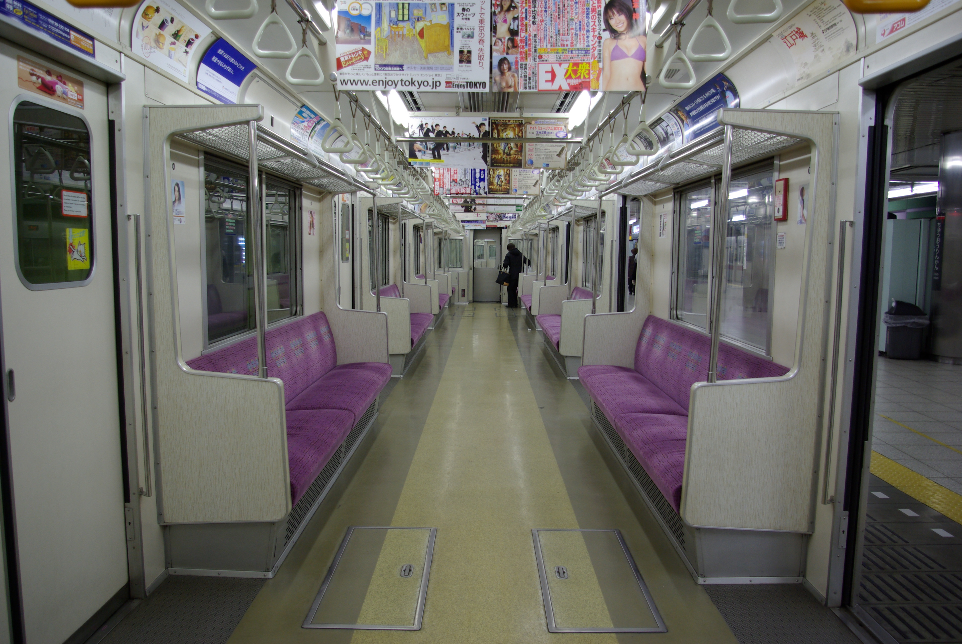 東京地下鉄8000系 8415 車内